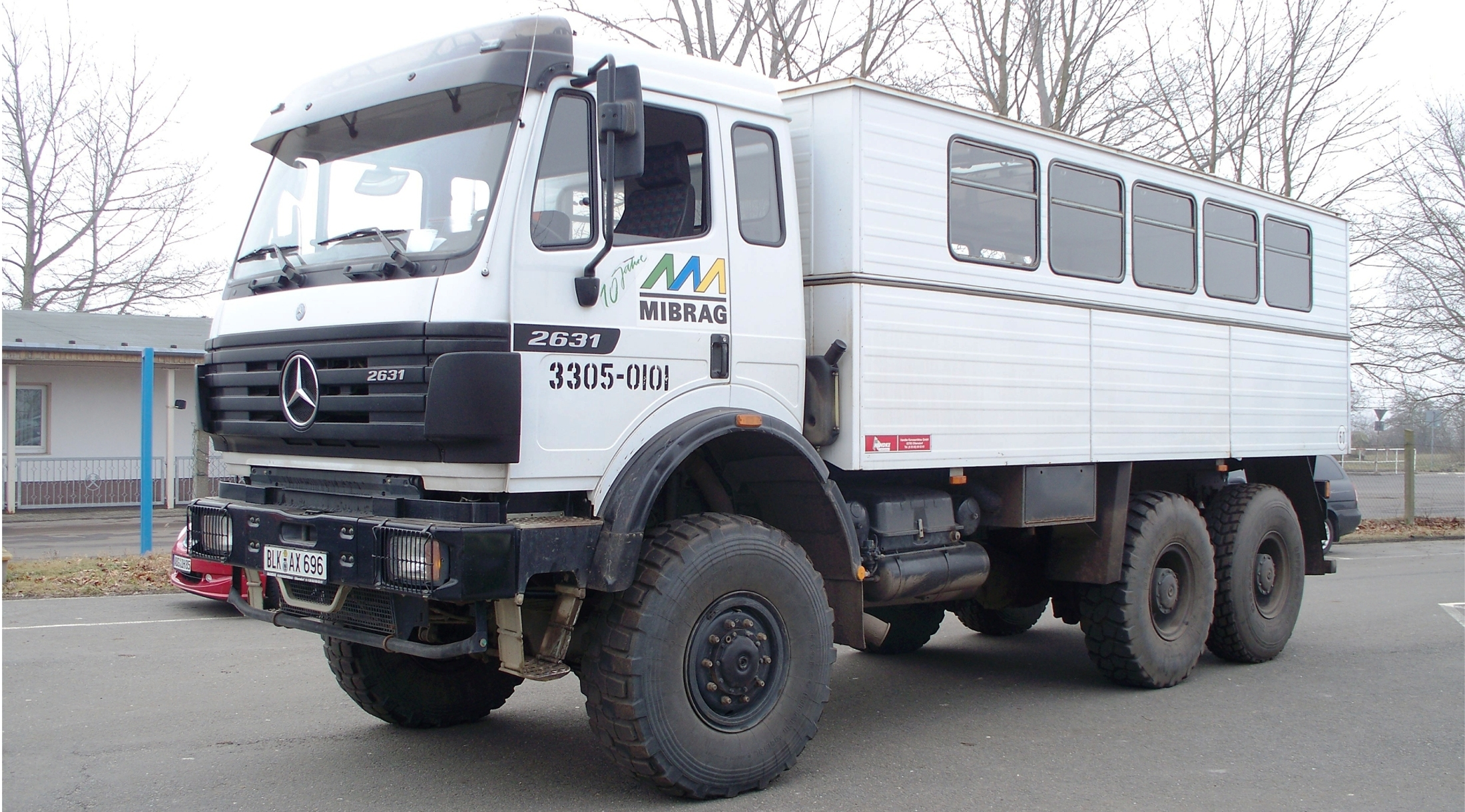 Ein geländegängiger Bus auf einem Mercedes-Benz-LKW-Chassis. Das Fahrzeug findet beim Braunkohletagebau Vereinigtes Schleenhain der MIBRAG Verwendung.